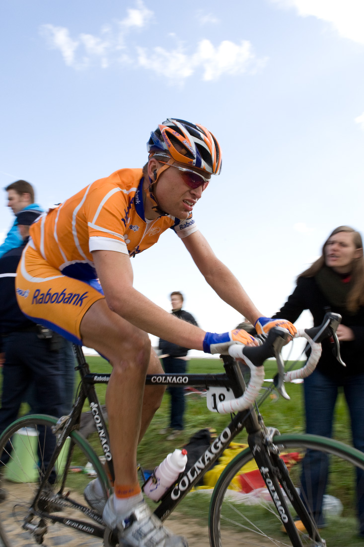 Joost Posthuma (Paris-Roubaix 2008)